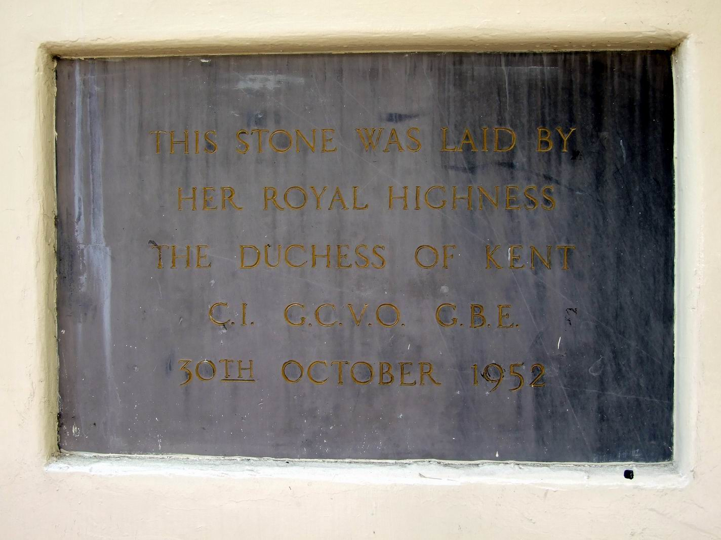 麥花臣室內場館奠基石